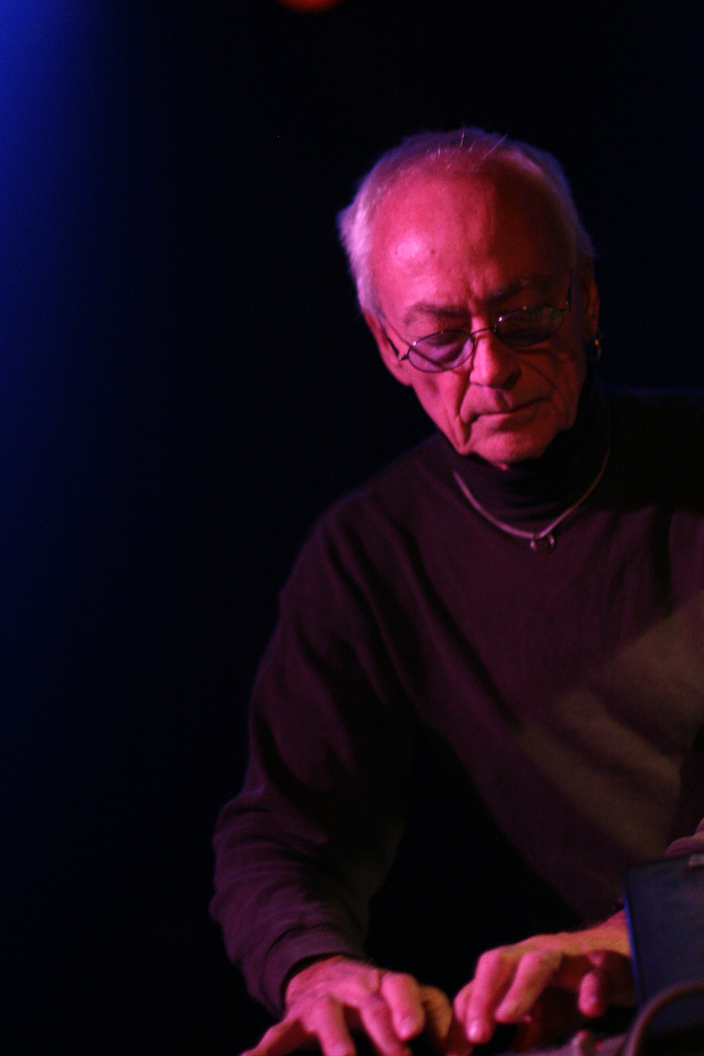 Silver Apples à Barcelona, Salle Apolo La